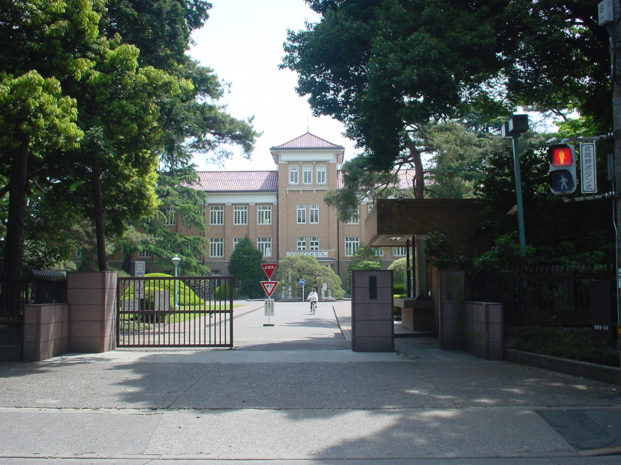 津田塾大学（2006年5月6日投稿者が撮影）